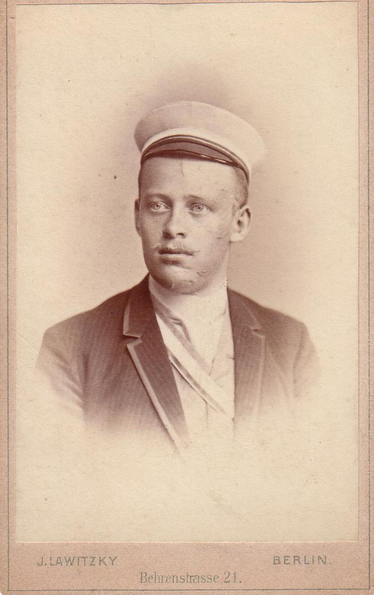 Fotografie von Richard von Schaewen (1869-1952) als Corpsstudent in Königsberg